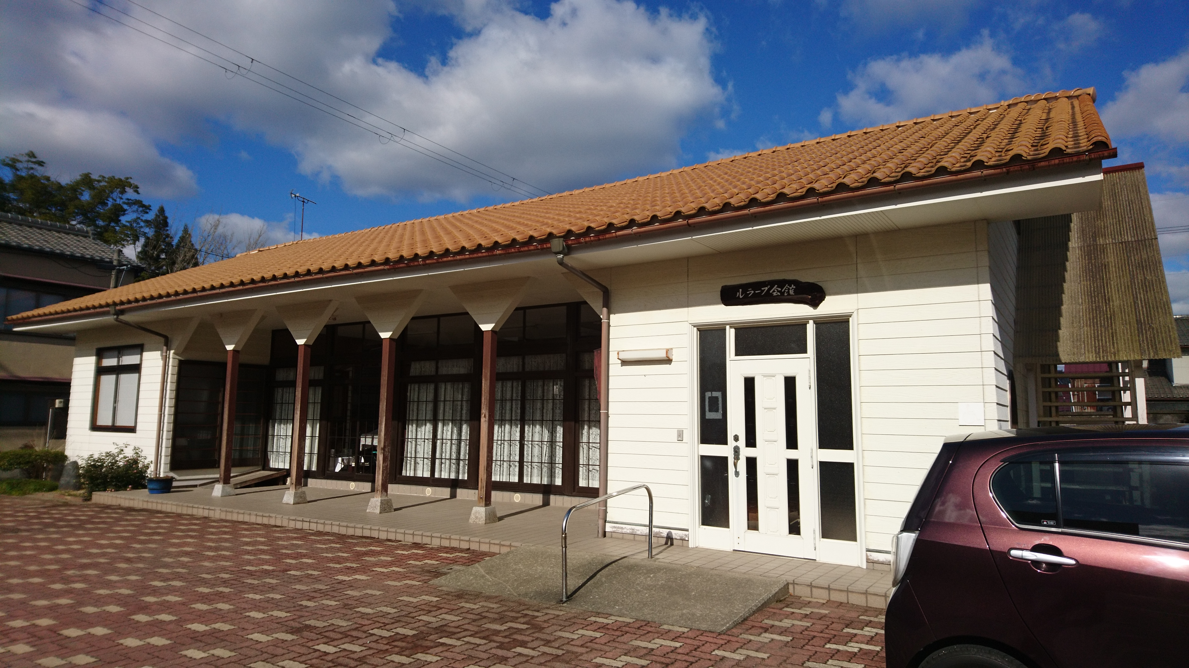 カトリック宮津教会に併設するルラーブ会館